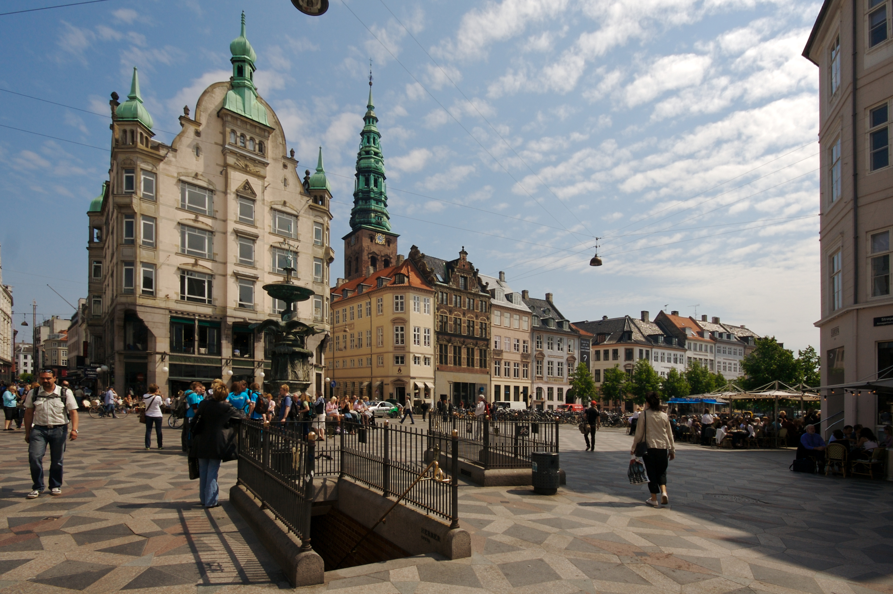 Strøget